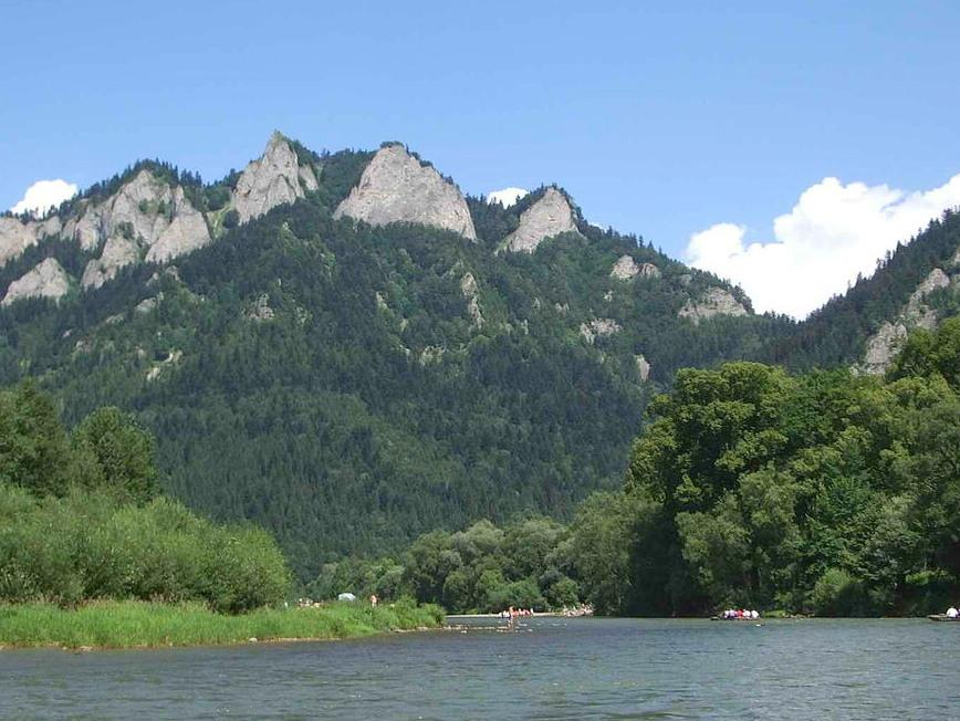 Westkarpaten, Mittlere Beskiden, Pieniny, Trzy Korony (Gipfel „Drei Kronen“), Dunajez Fluss, Polen